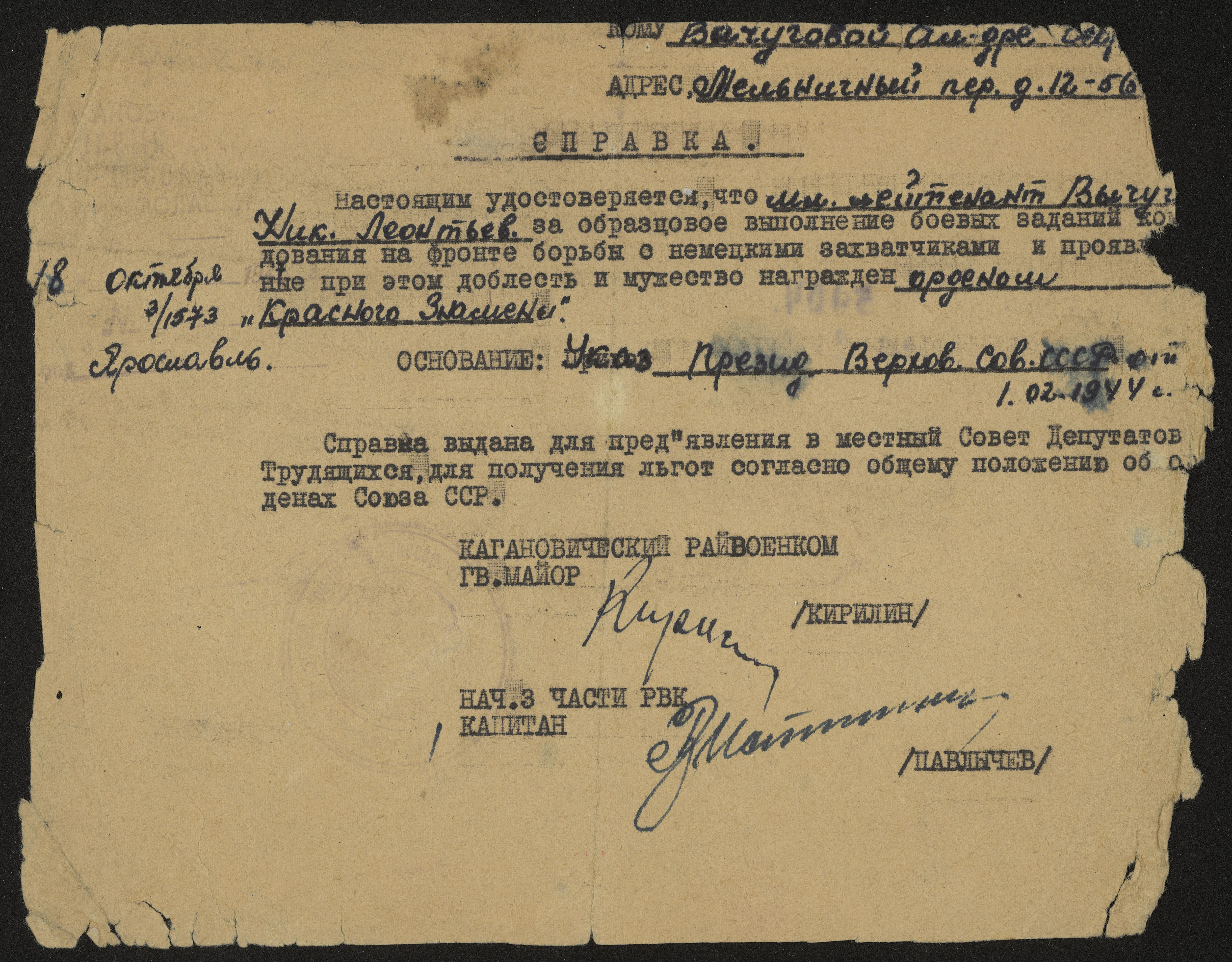 Справка о награждении младшего лейтенанта Вычугова Николая Леонтьевича, погибшего в 1942 году во время Сталинградской битвы, орденом Красного знамени.